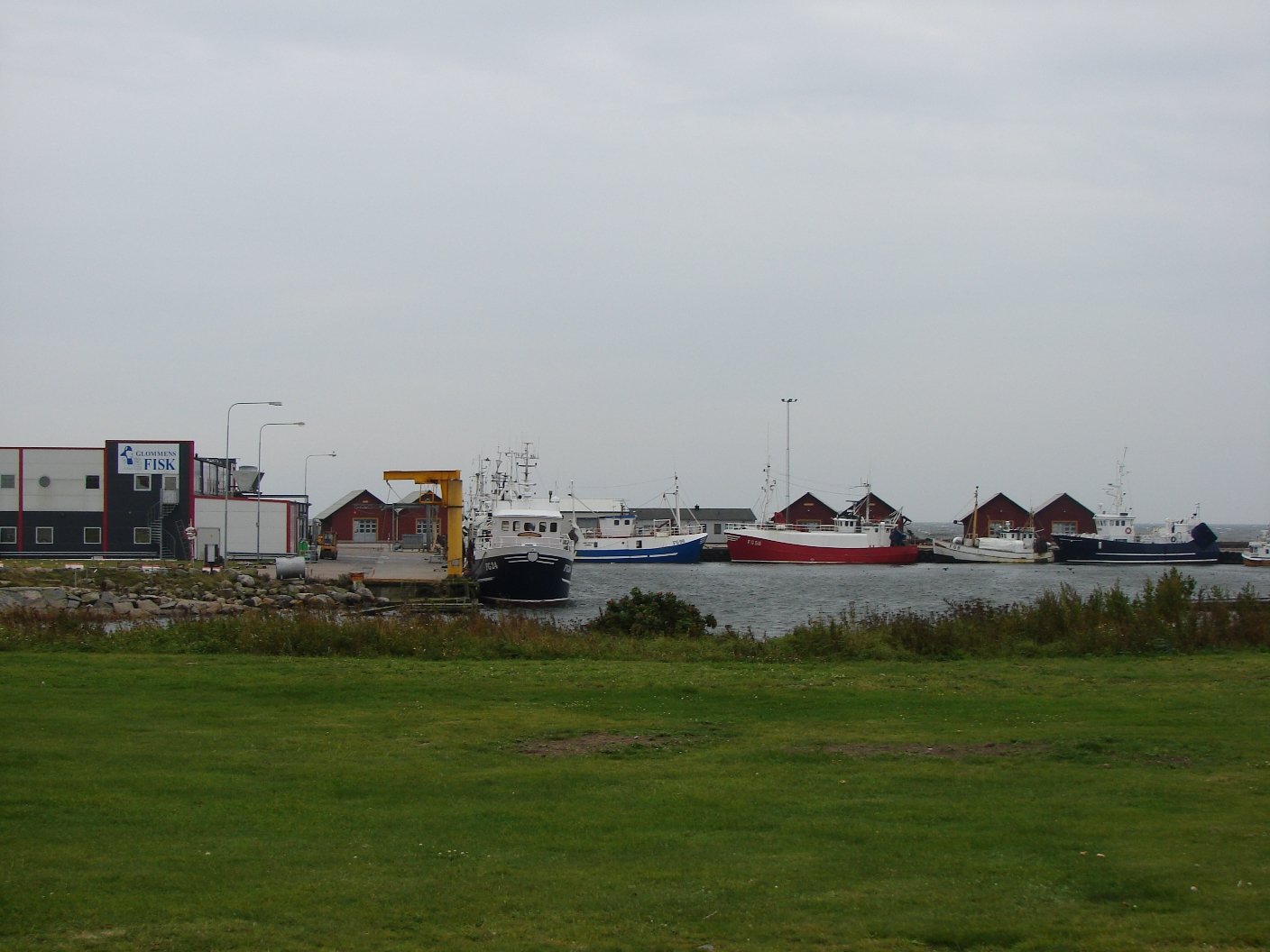 Hafen und Fischfabrik in Glommen (Schweden)